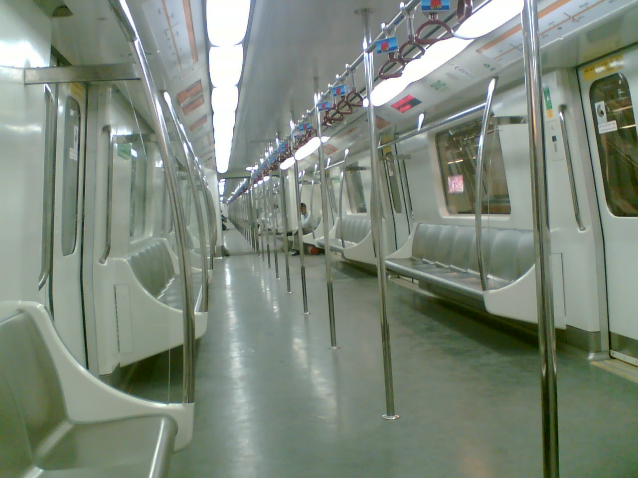 Inside a Metro coach.